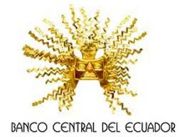 Escudo del Banco Central del Ecuador